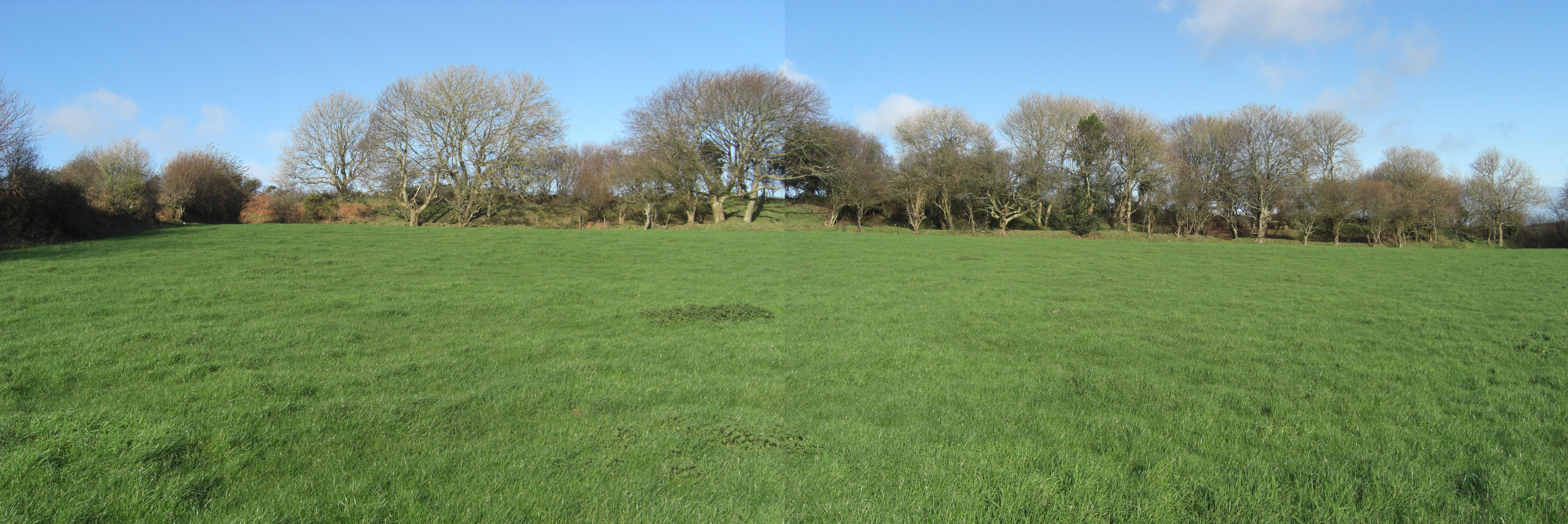 Photographie prise d'une haie. Ici la Face sud du Hague Dike. Elle permet de mieux rendre compte de cette fortification préhistorique baptisée de "Terres Levées" ou Hague Dike par les Scandinaves lors des invasions vikings. Elle permettait d'isoler la péninsule de la Hague des invasions venant de terre.